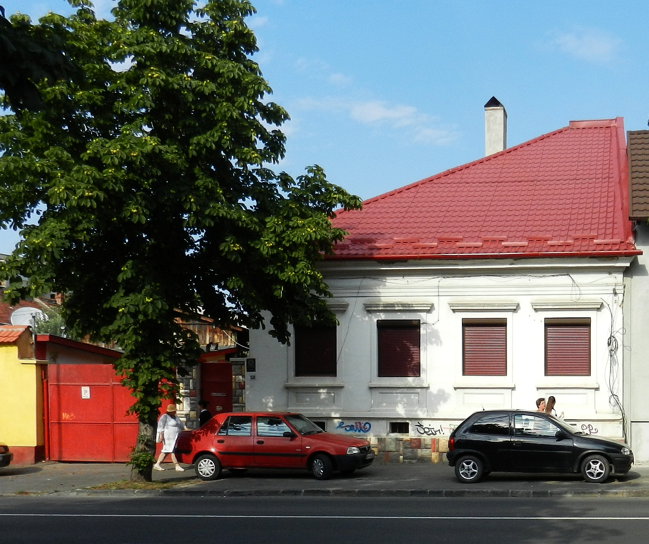 Casa monument istoric (Lunga 120)